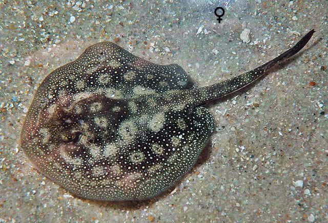 Urobatis jamaicensis